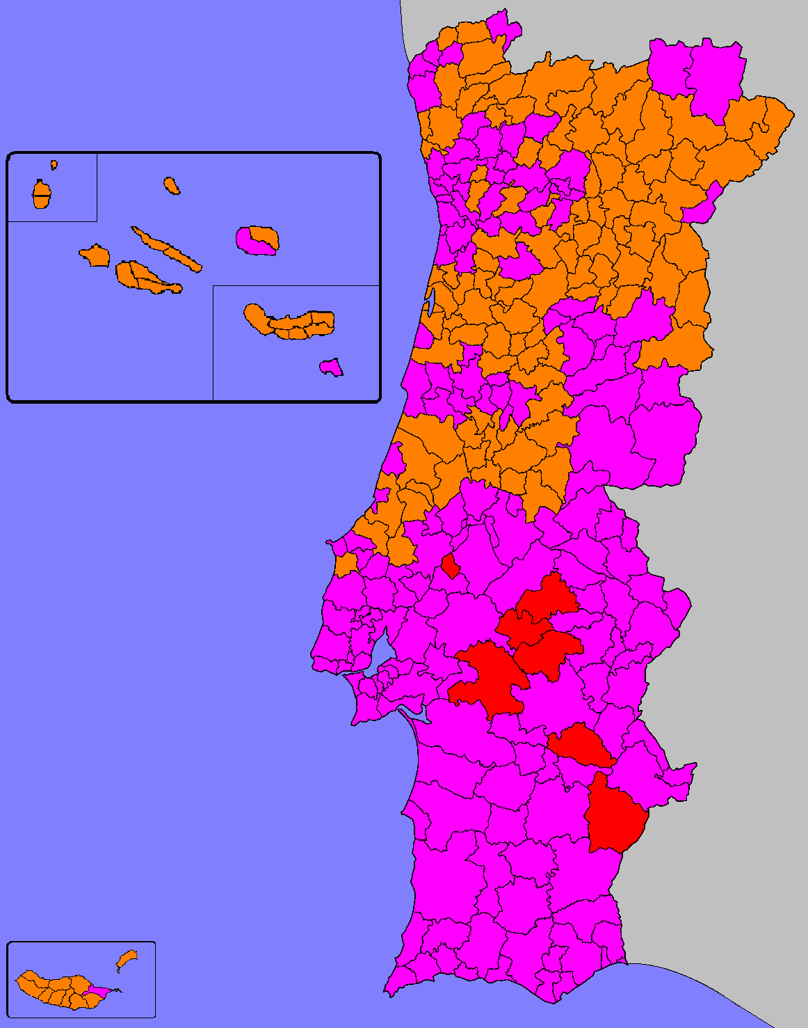 Mapa ilustrativo do partido mais votado por Concelho